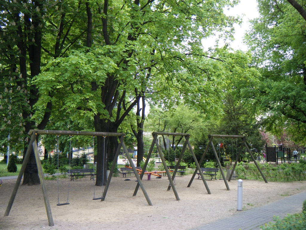 Ognisko Pracy Pozaszkolnej nr 2 im. dra Henryka Jordana przy ul. Alfreda Nobla 18/26 w Warszawie.